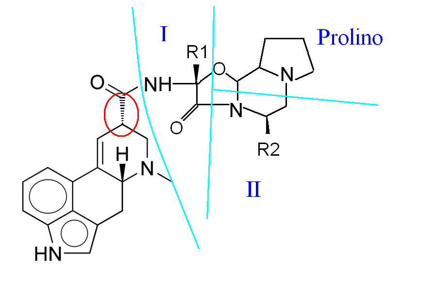 Strukturo de ergopeptinoj